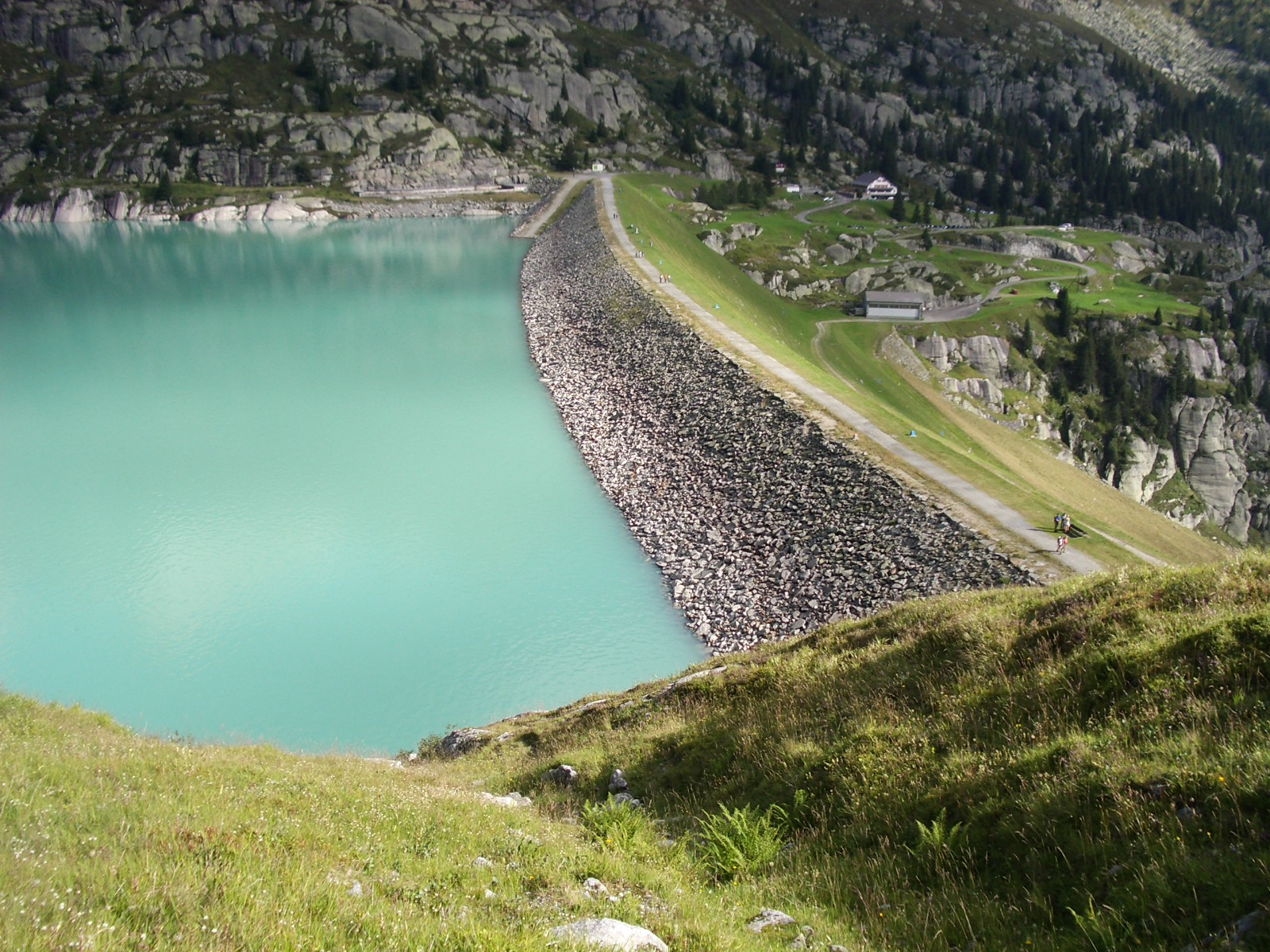 Göscheneralpsee, Switzerland